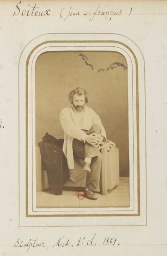 Jean-François Soitoux en 1851 ; photo provenant de Recueil. Portraits d'artistes, école française] Date d'édition : 1860-1870 Sujet : Portraits -- 1800-1869 BNF/Gallica